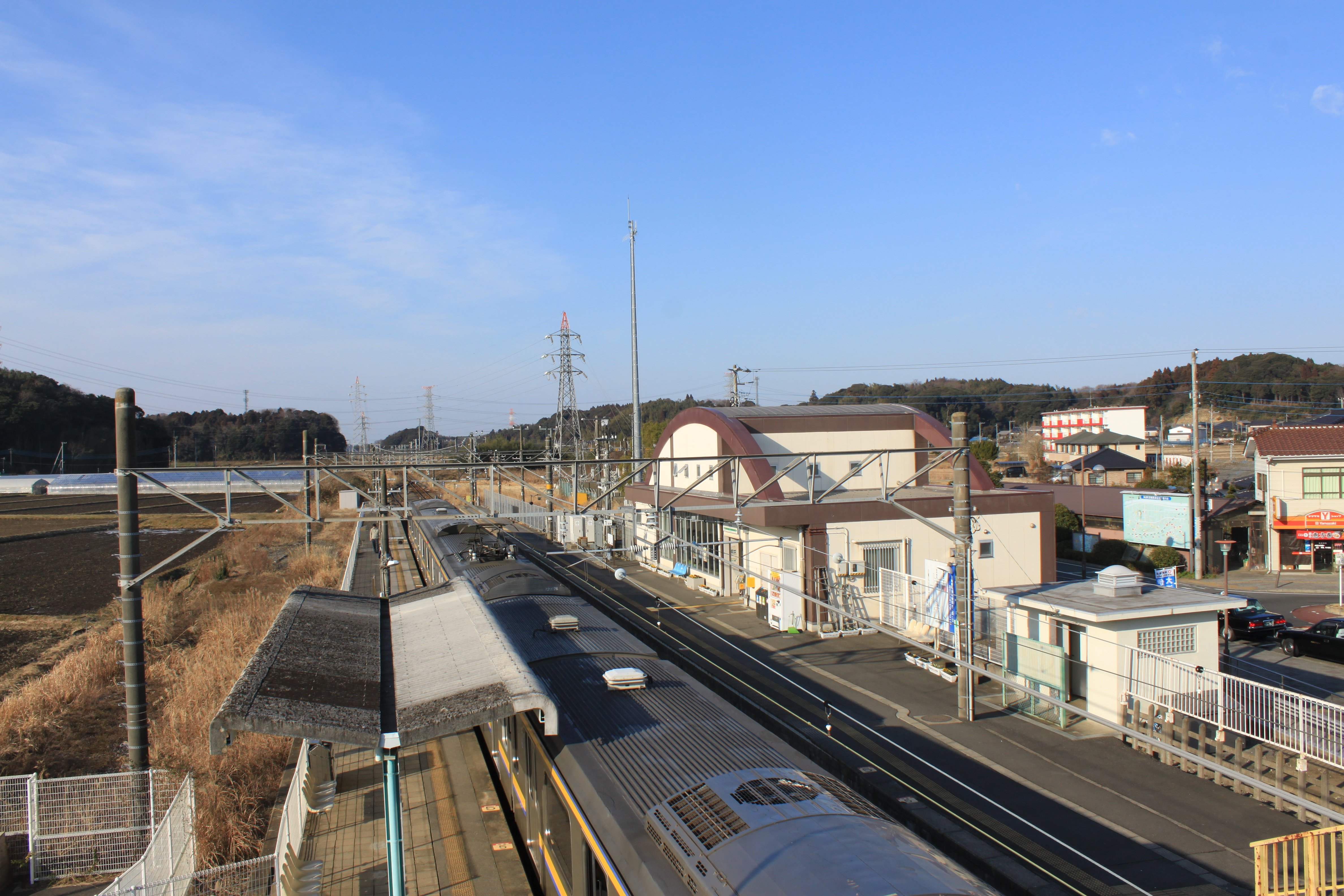 下総神崎駅